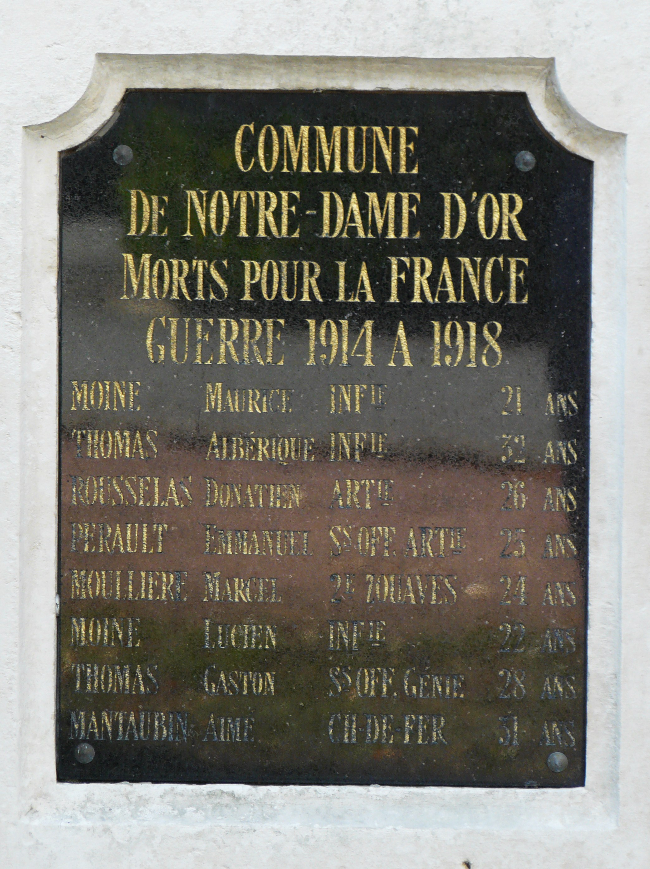 Plaque du monument aux morts de Notre-Dame-d'Or, La Grimaudière, Vienne, France.